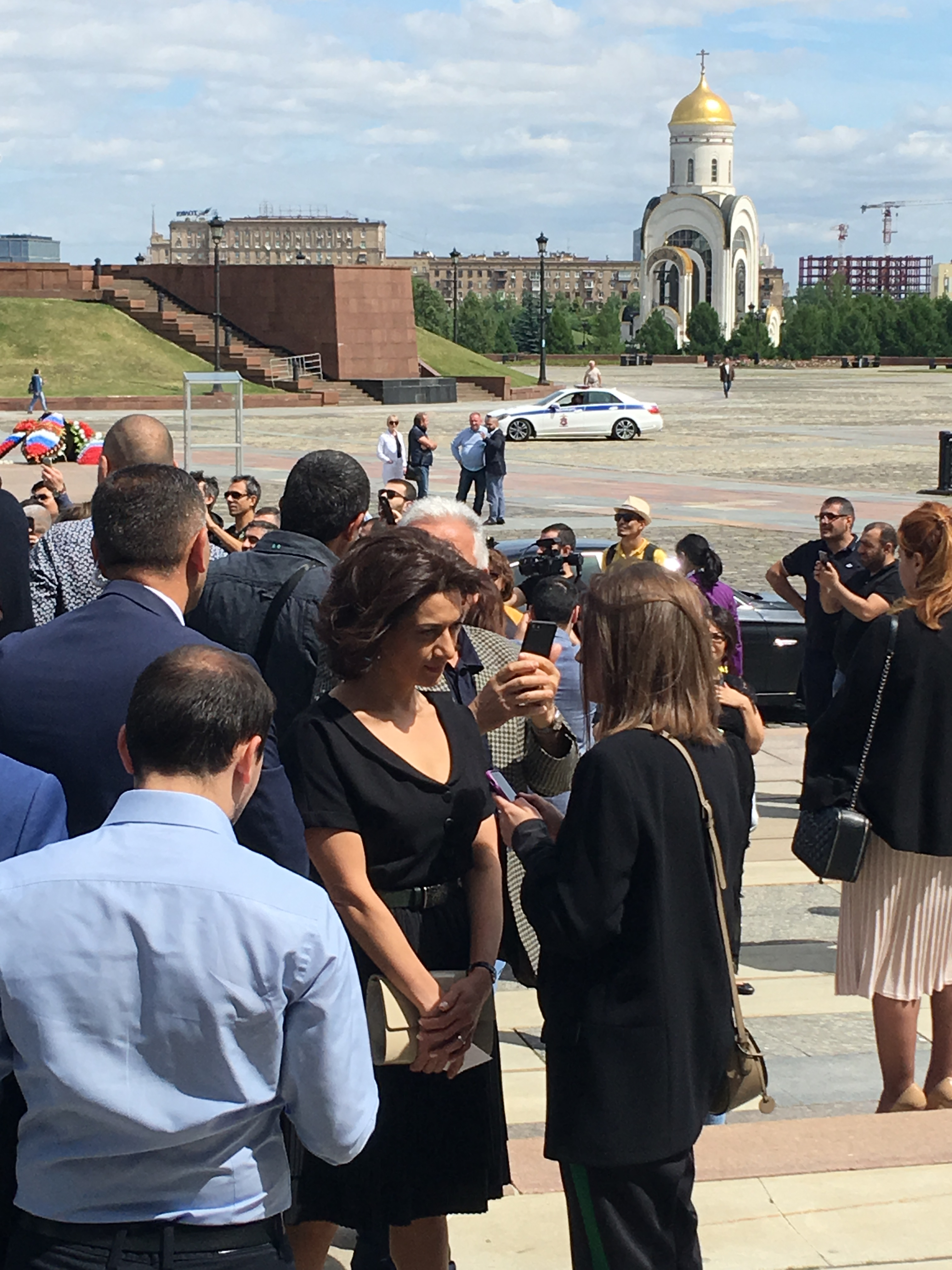 Հայաստանի առաջին տիկին Աննա Հակոբյանը Մոսկվայում, 2018 թվականի հունիսի 14